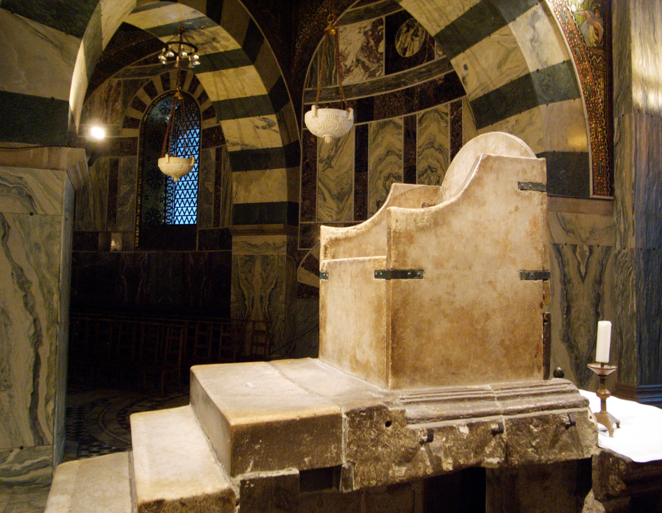 Karlsthron im Aachener Dom